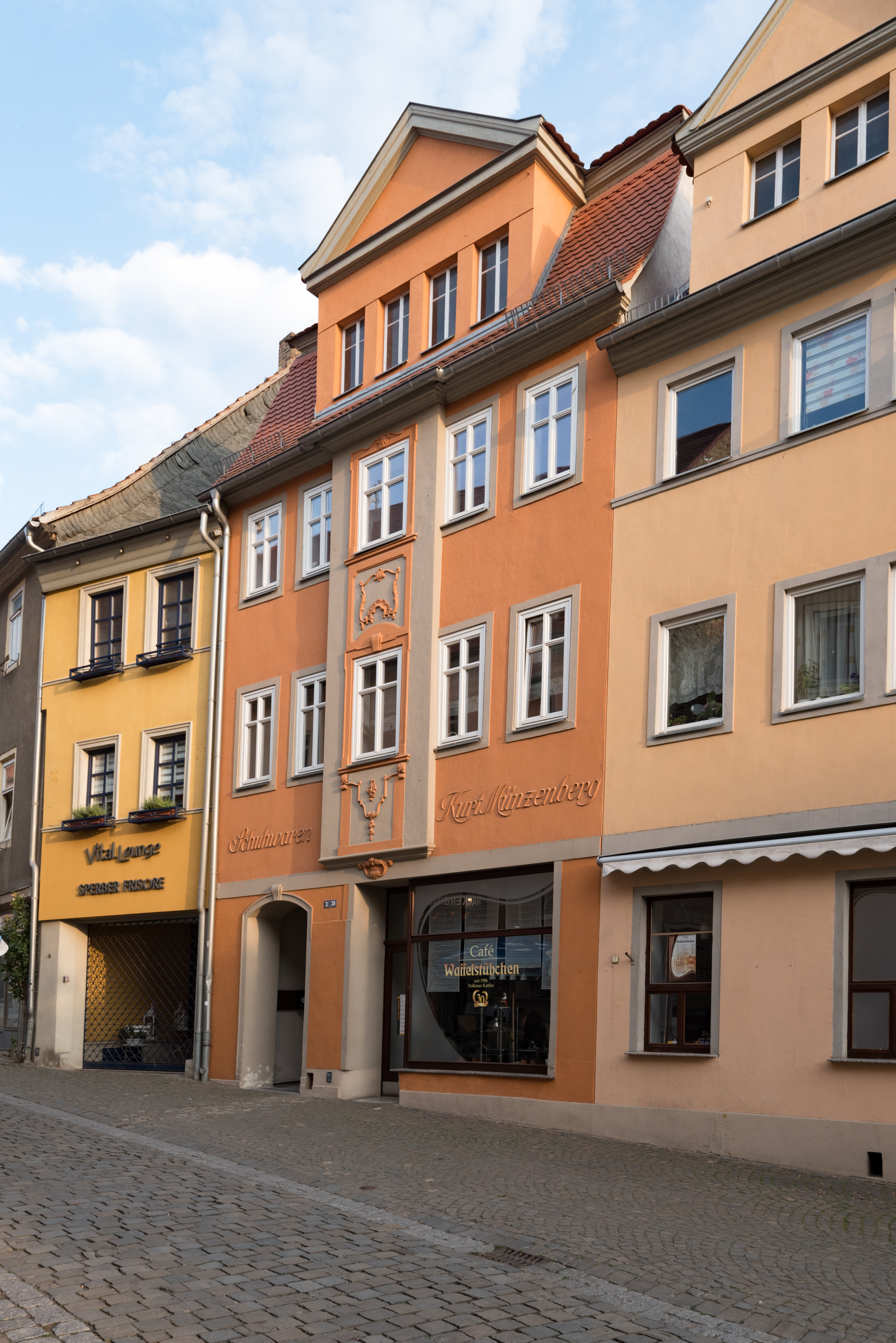 Naumburg (Saale), Steinweg 31, 30